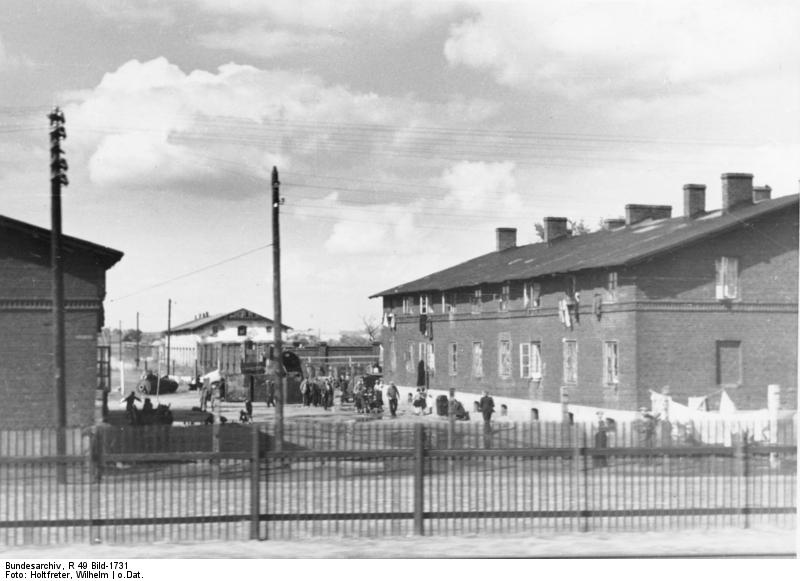 Polen, Ghetto Kutno Wartheland, Kutno, D.[eutsches] R.[eich] Das Ghetto in Kutno